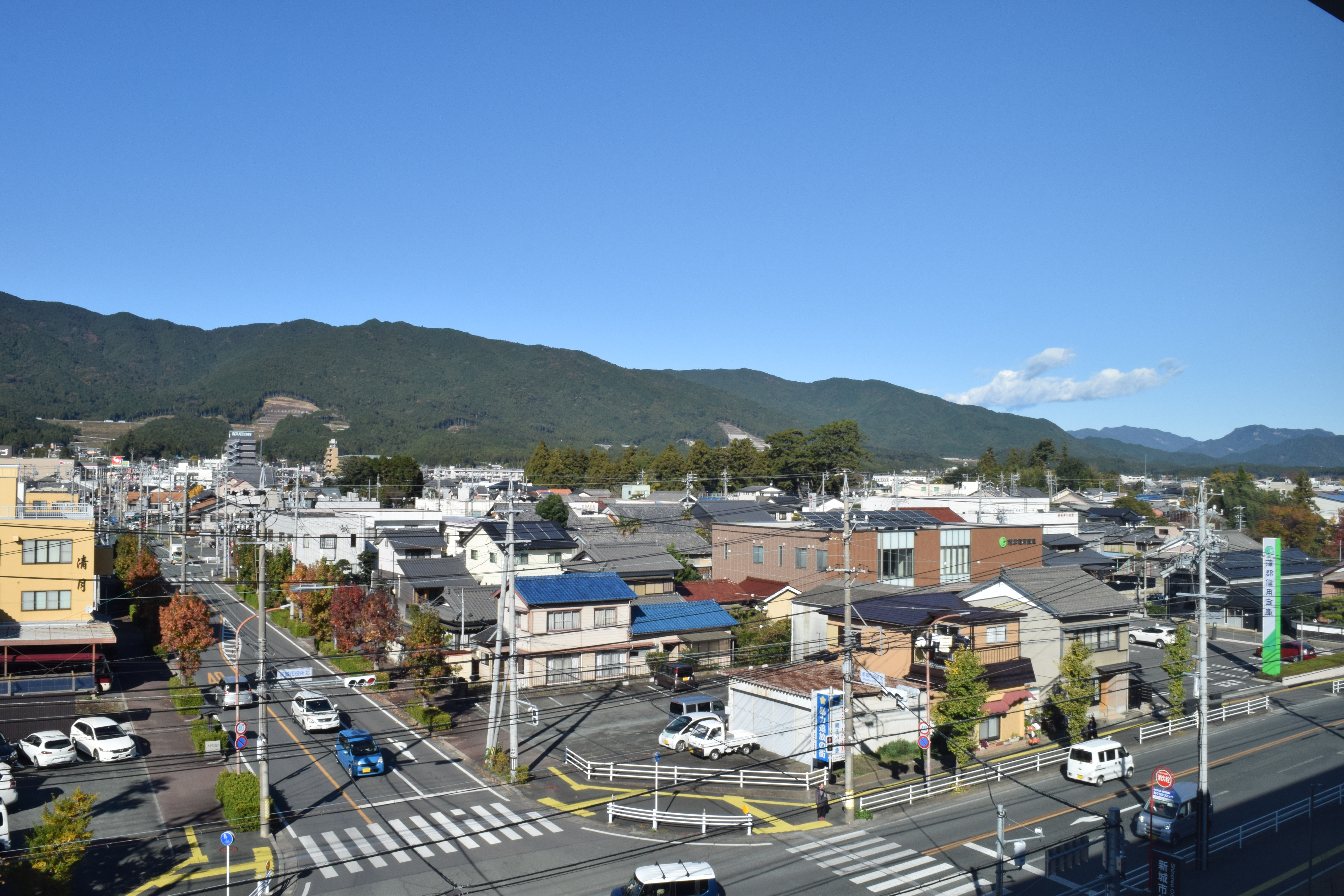 新城市街地景色